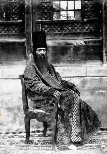 امیراصلان خان مجدالدوله